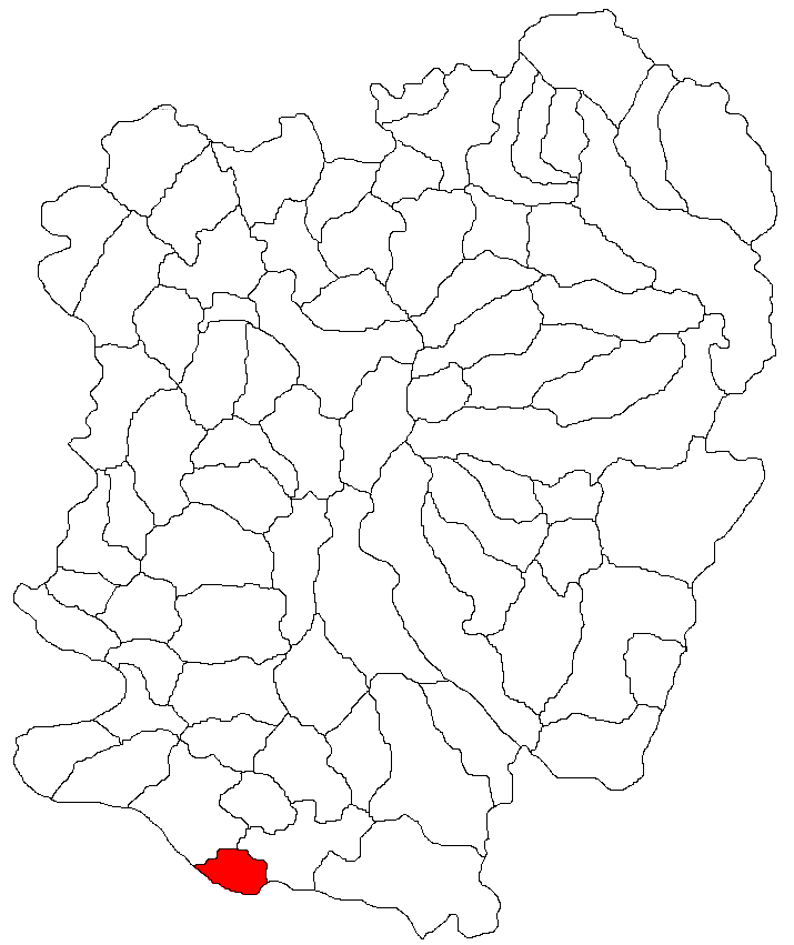 Categorie:Hărţi ale judeţului Caraş-Severin